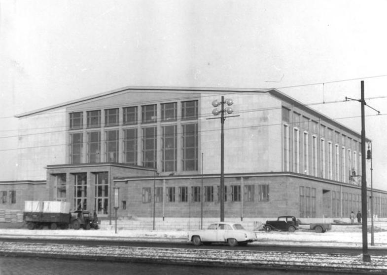 Berlin, Dynamo-Sporthalle Zentralbild WEr-Bay 21.1.1958 Neue repräsentative Sporthalle für Berlin In Berlin-Hohenschönhausen (Weissenseer Weg) wird am 25.1.1958 die Dynamo-Sporthalle eingeweiht. Nach der Werner-Seelenbinder-Halle und der Deutschen Sporthalle ist der repräsentative Bau die dritte Sportstätte im demokratischen Teil von Berlin, in der überdachte Großveranstaltungen ausgetragen werden können. (Siehe ADN-Meldung Nr. 608 vom 21.1.1958) UBz: die neuerbaute Dynamo-Sporthalle vom Weissenseer-Weg aus.